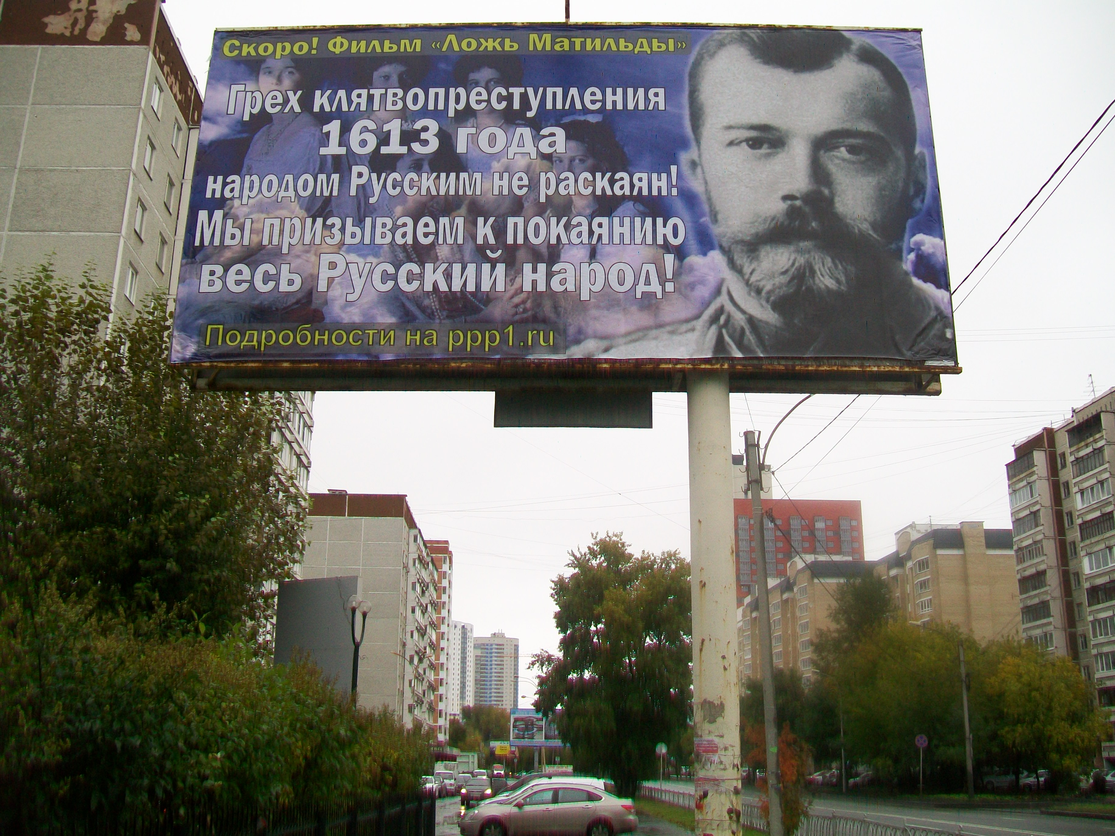 Щит Ложь Матильды в Екатеринбурге. Сентябрь 2017 года